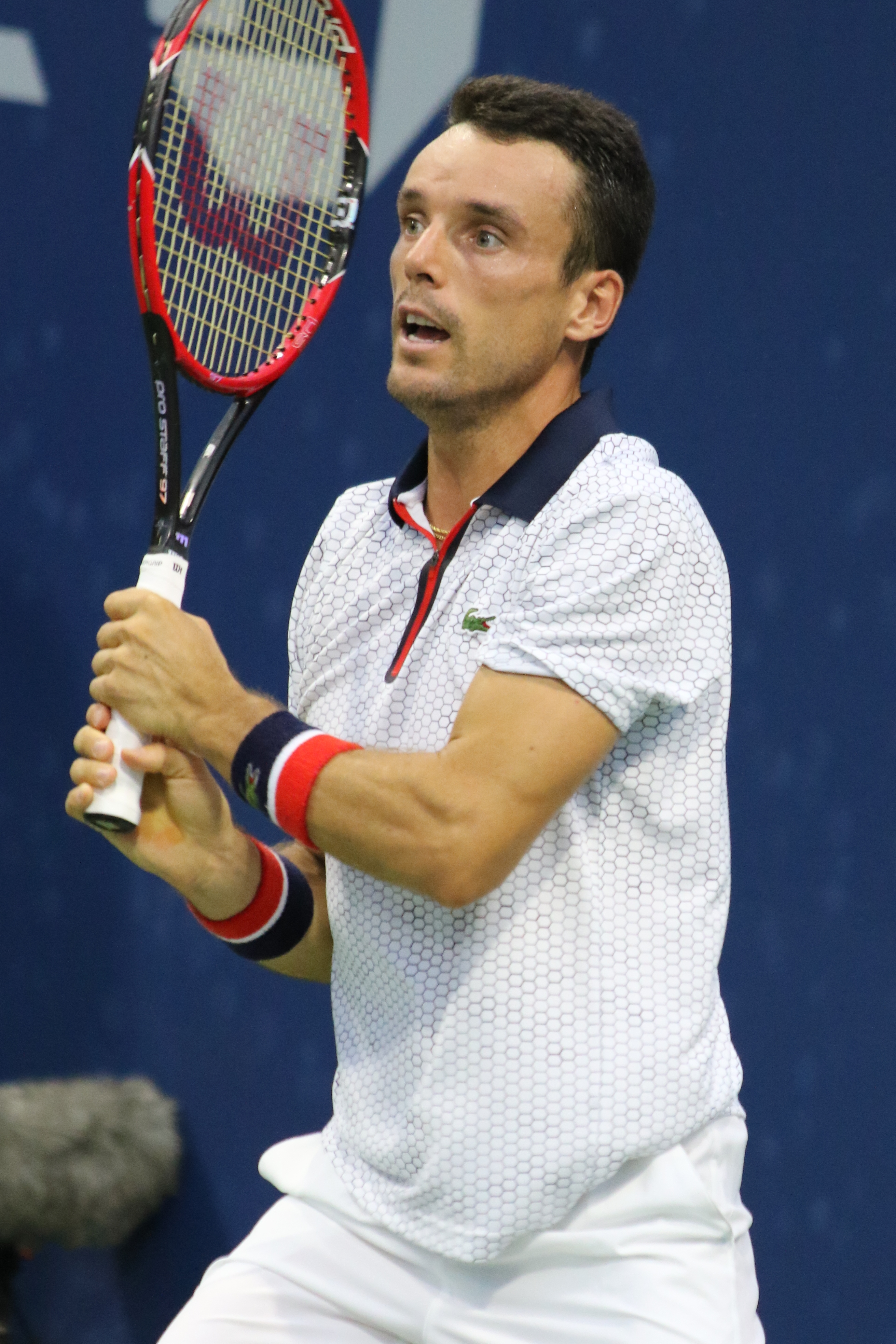 Bautista Agut US16 (1)